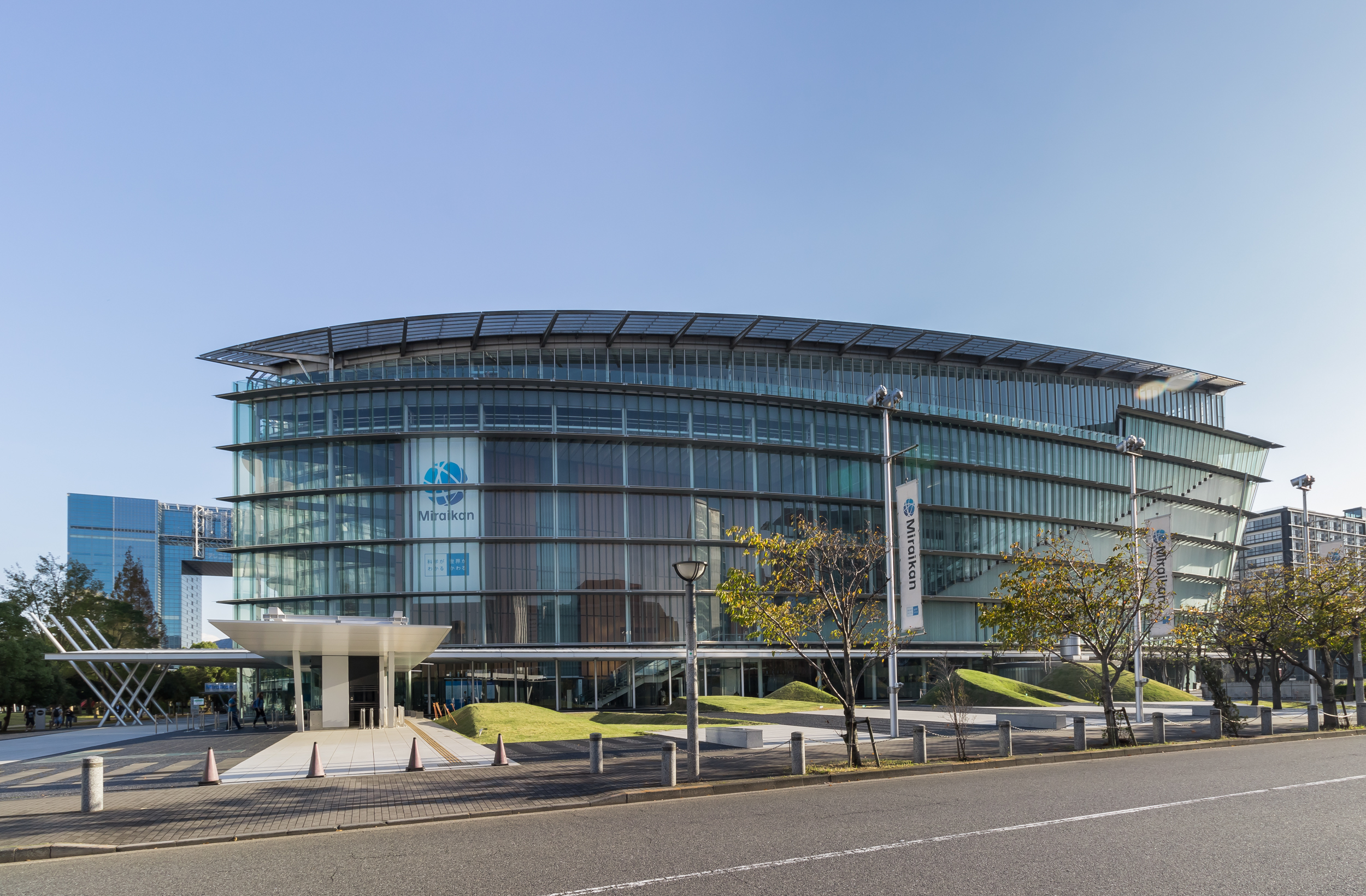 日本科学未来館。東京都江東区。